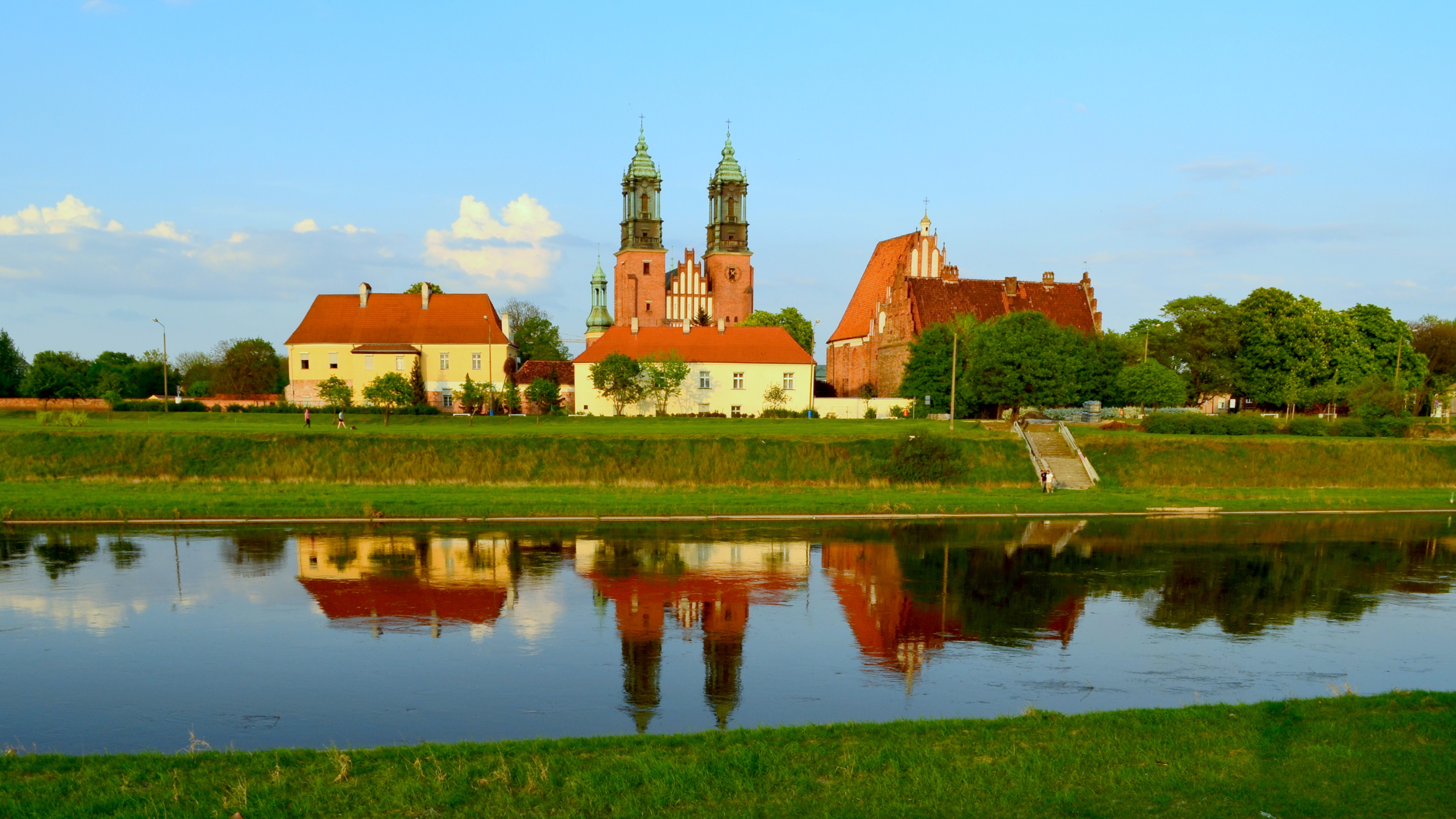 Poznań, Ostrów Tumski ze Śródką, poł. X, XIII